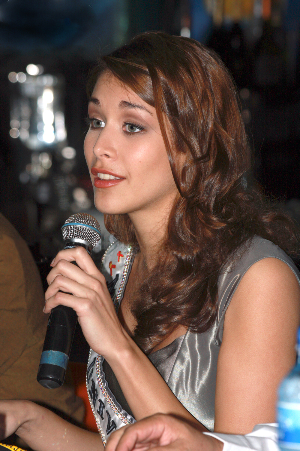 Miss Universe 2009 Dayana Mendoza en Managua, Nicaragua, apoyando la campaña de PASMO "Y vos, como te cuidás del SIDA"